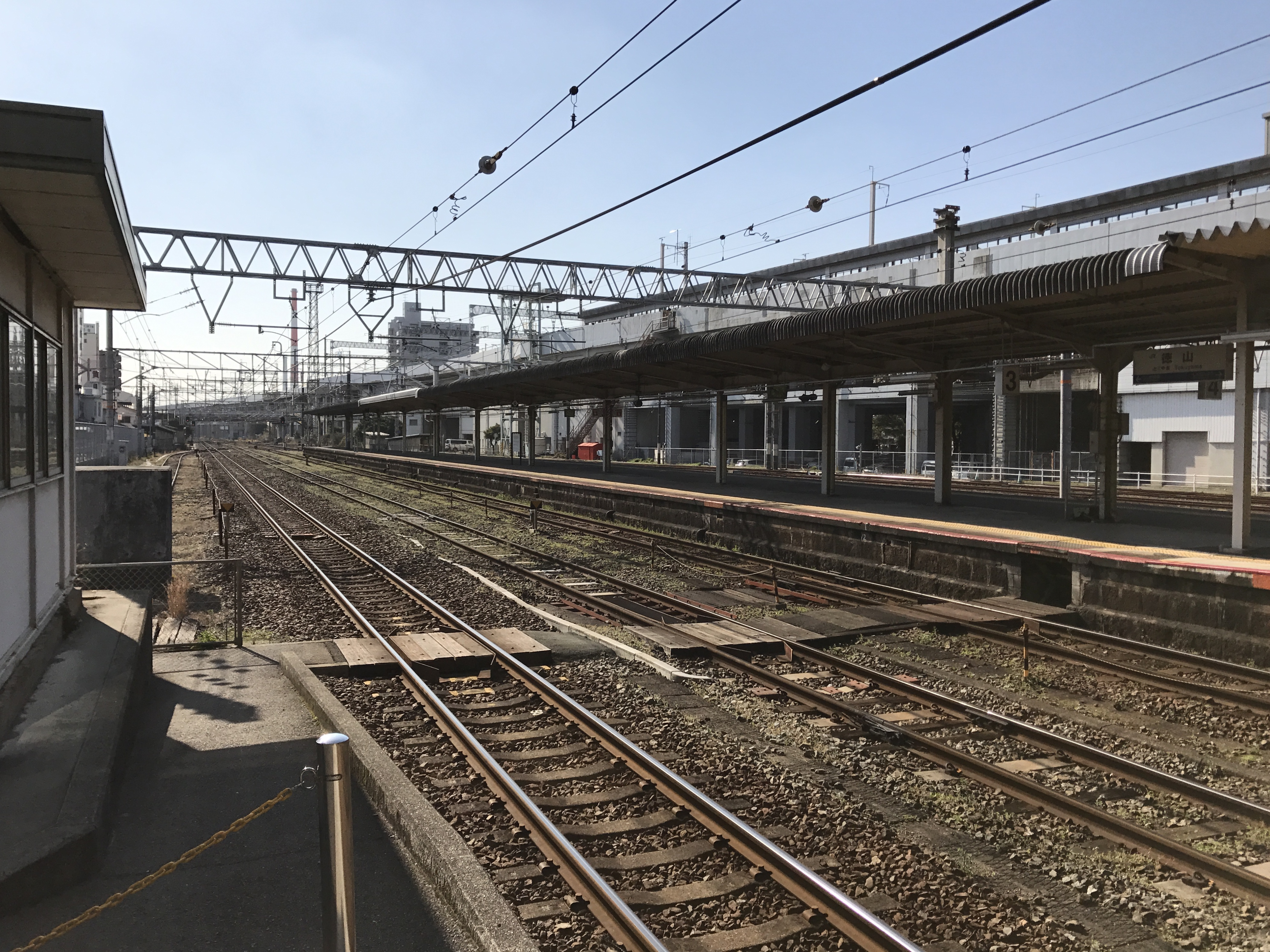 徳山駅(山陽本線)のホーム(奥は櫛ヶ浜方面)